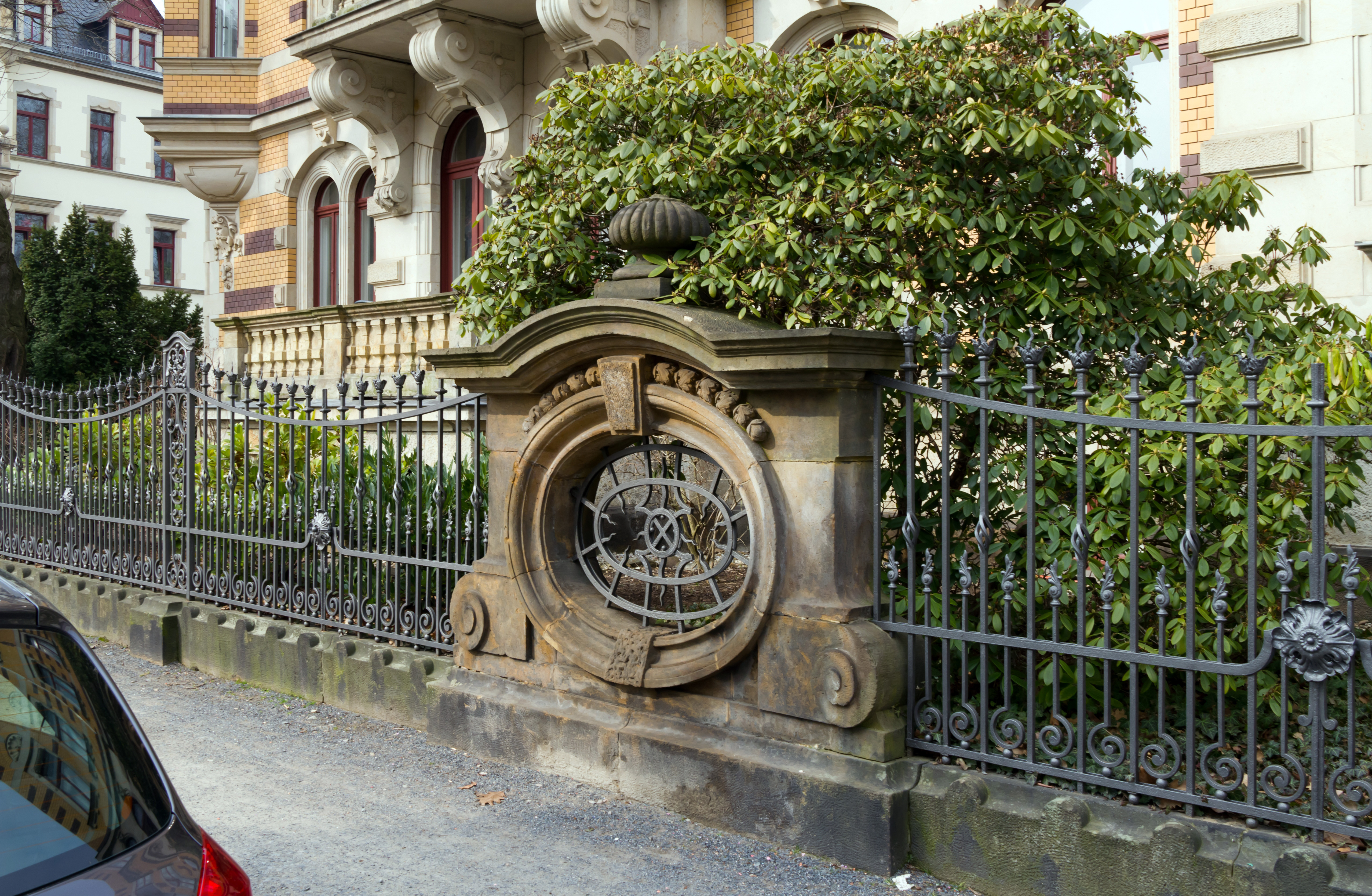 Niederwaldstraße 37